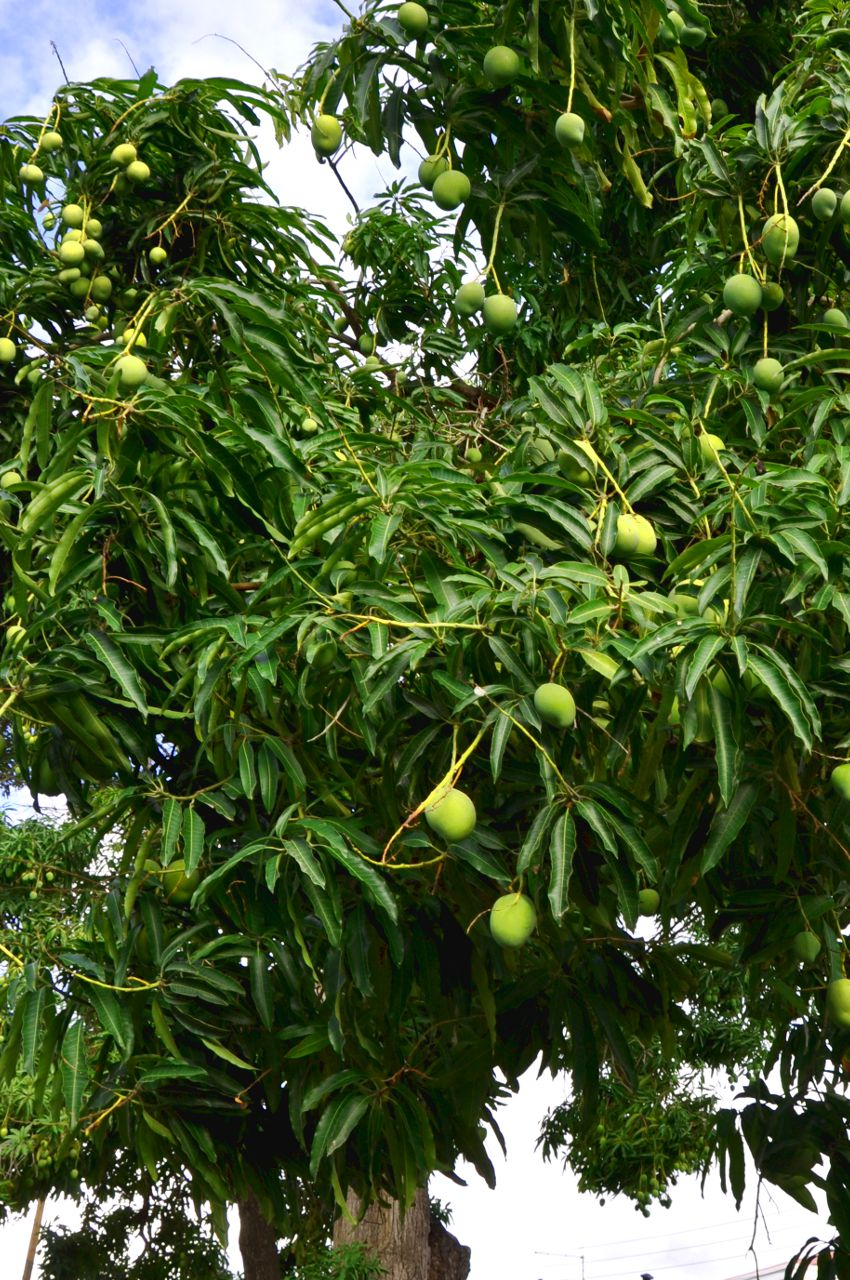 Fruits de manguier en maturation.